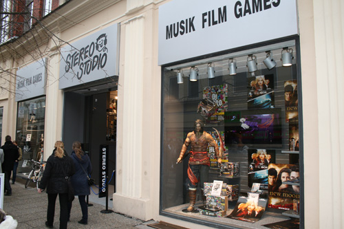 Stereo Studio butikken på Købmagergade i København. To etager med musik, film, spil og bøger.